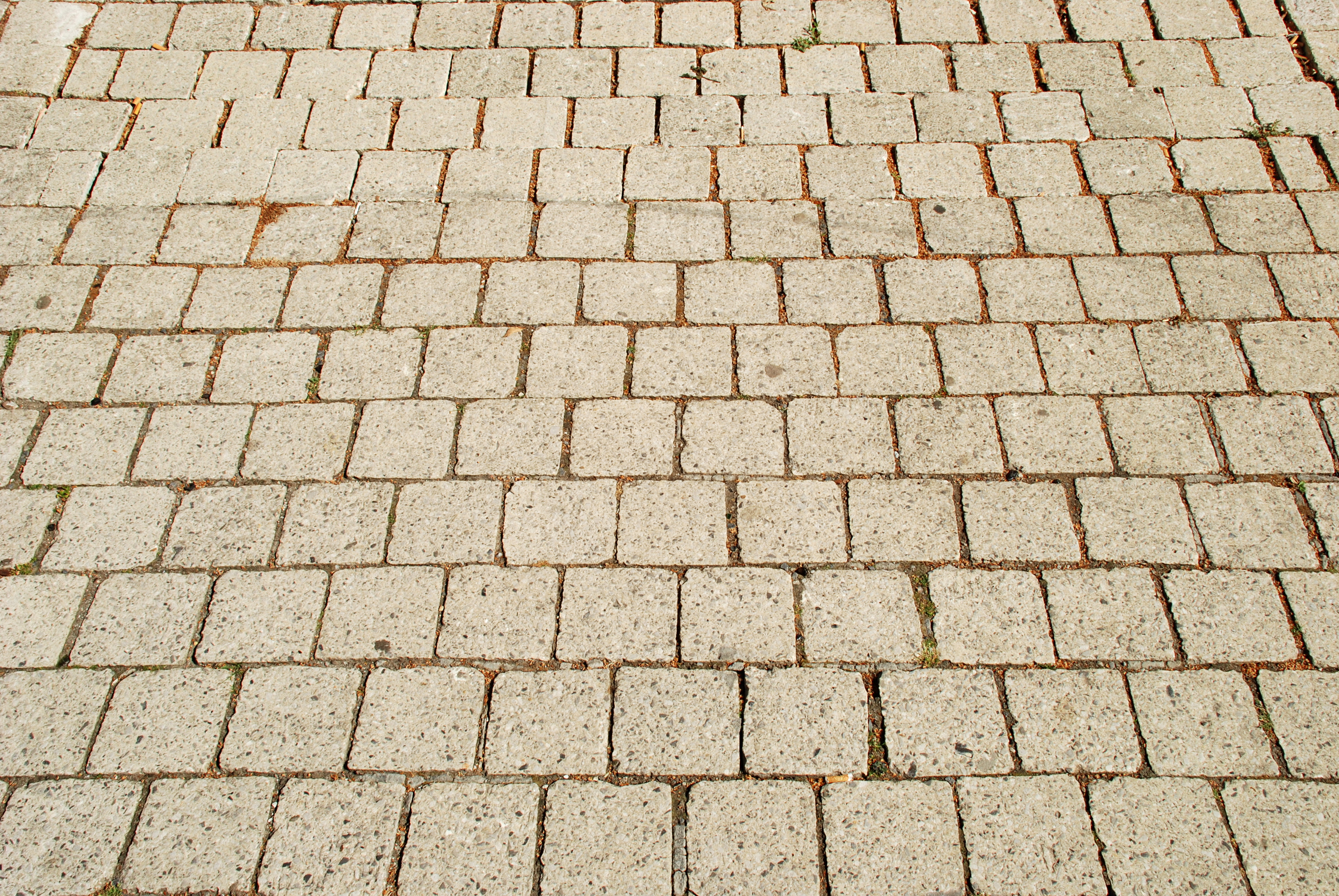 Belgique - Louvain-la-Neuve - Bibliothèque des Sciences (architecture brutaliste - architecte André Jacqmain - 1973)